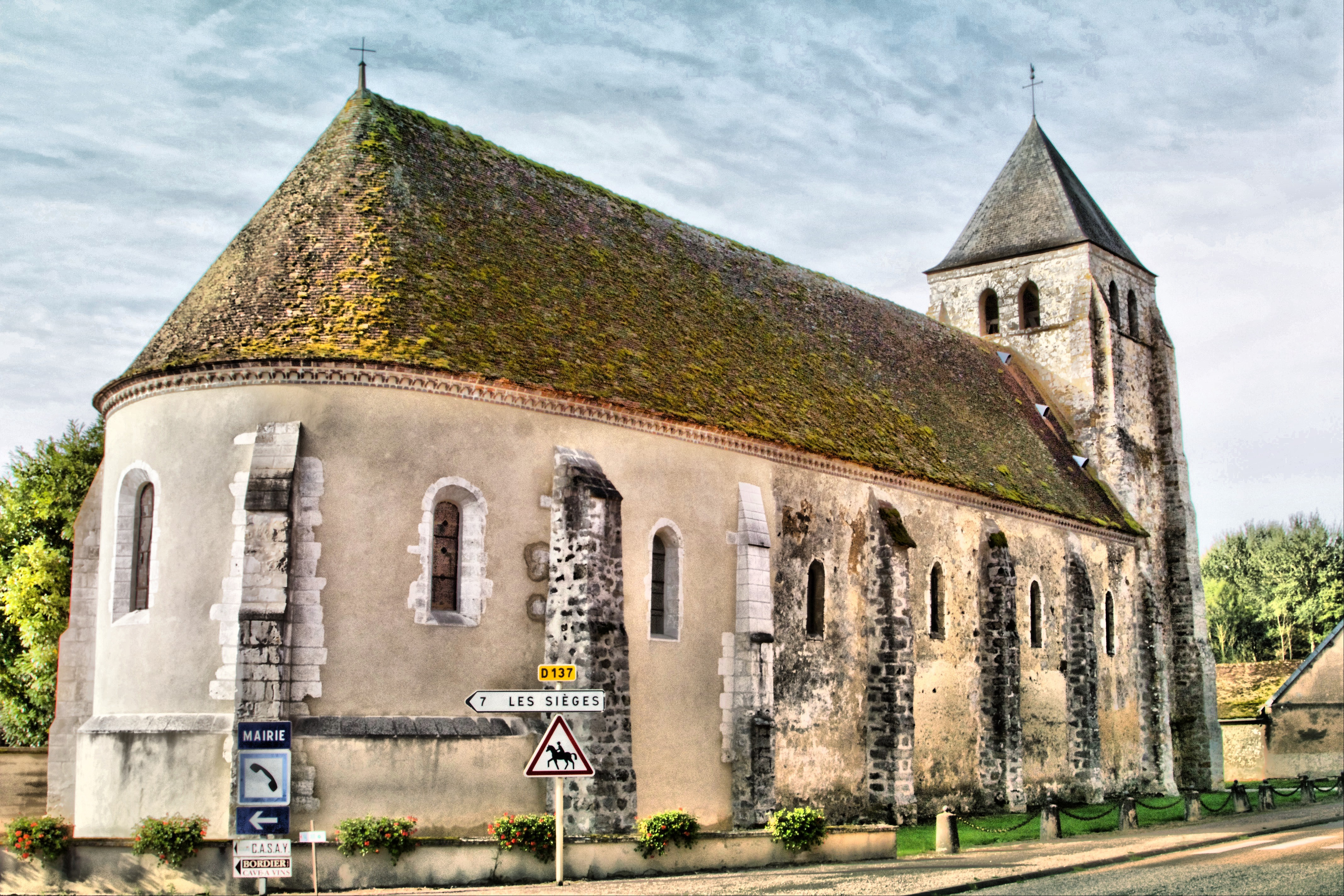 Église de Molinons